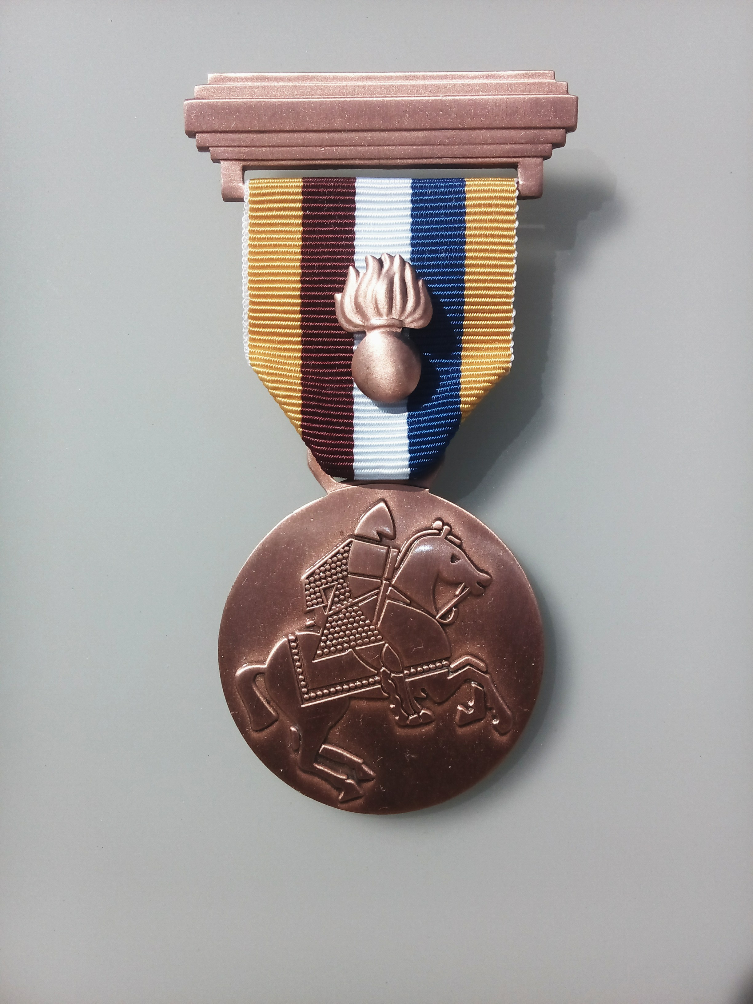 Teilnehmermedaille des Marche International de Diekirch (Luxembourg) in bronze, Ausführung für eine Teilnahme von 2 x 20 km.